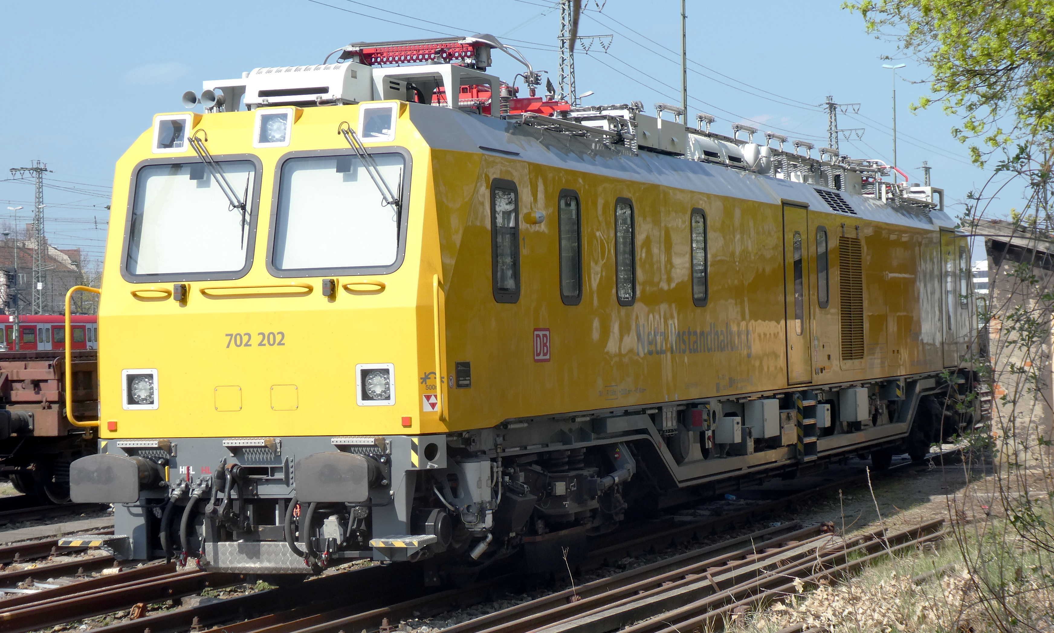 Bautriebwagen 702 202 der Baureihe 702 der Deutschen Bahn (Diagnose-Verbrennungstriebwagen, Hersteller Plasser + Theurer).